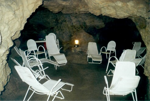 Teufelshoehle near Pottenstein, Therapiestation